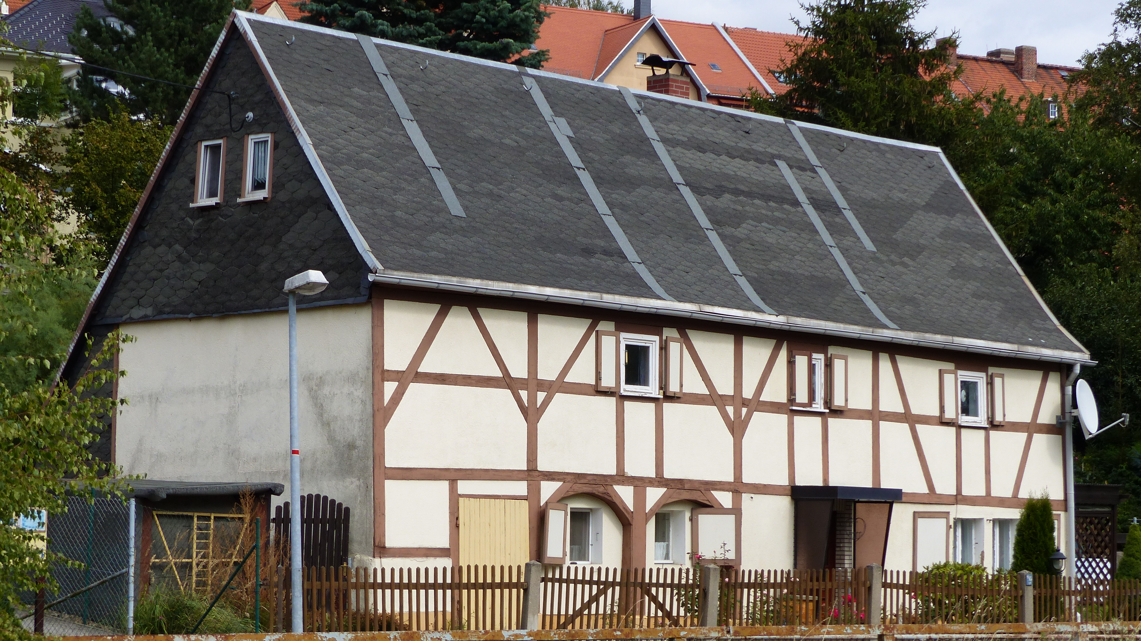 Umgebindehaus An der Seltenrein 2, Altlöbau, Löbau, Sachsen